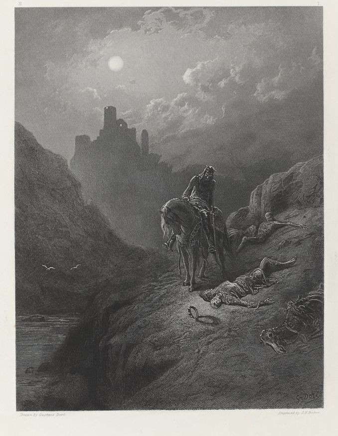 La couronne, en tombant, roula sur un point éclairé, et, tournant sur elle-même, glissa comme un ruisseau brillant dans la mare.